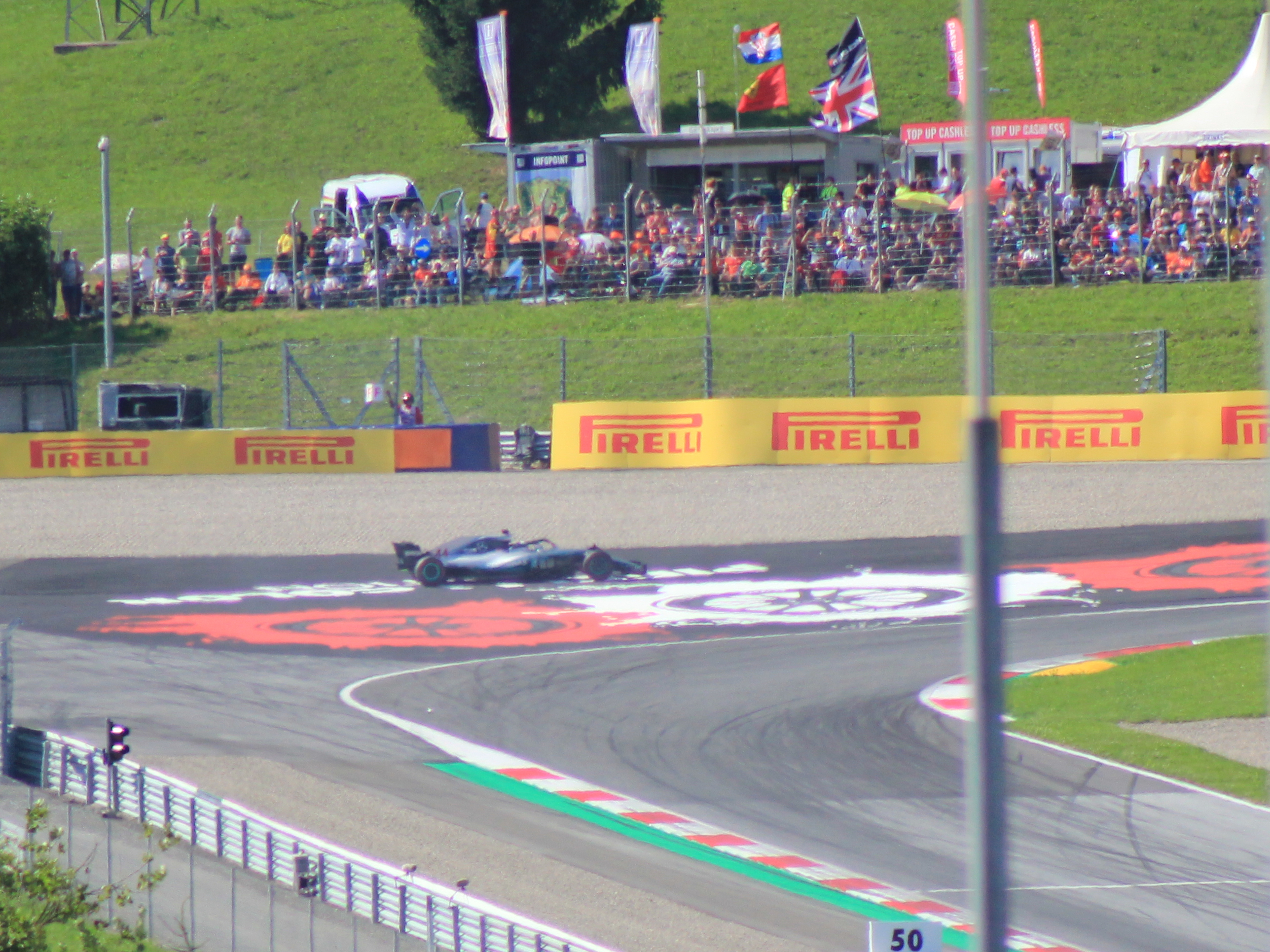 Szenen vom Rennen (Hamilton scheidet aufgrund eines Treibstoffdruck-Problems aus)